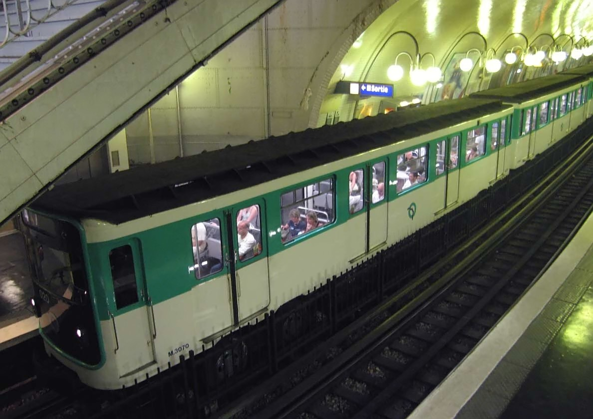 Metro Paris Rame MP59 ligne 4 station Cite Place : Paris, France Date : juin 2006 Auteur : Pline photo personnelle